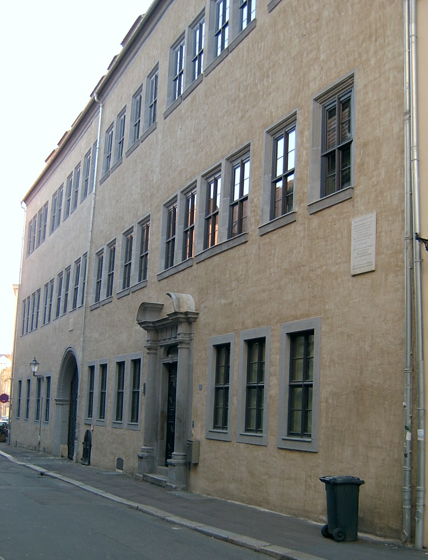 Große Märkerstraße 21/22 in Halle (Saale).